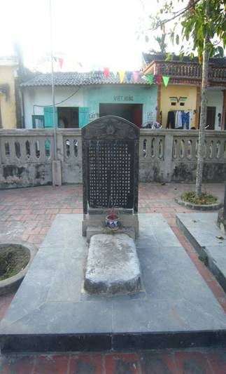 Hòn đá thám hoa Nguyễn Sư Lộ ngồi bên đường giảng bài cho học trò